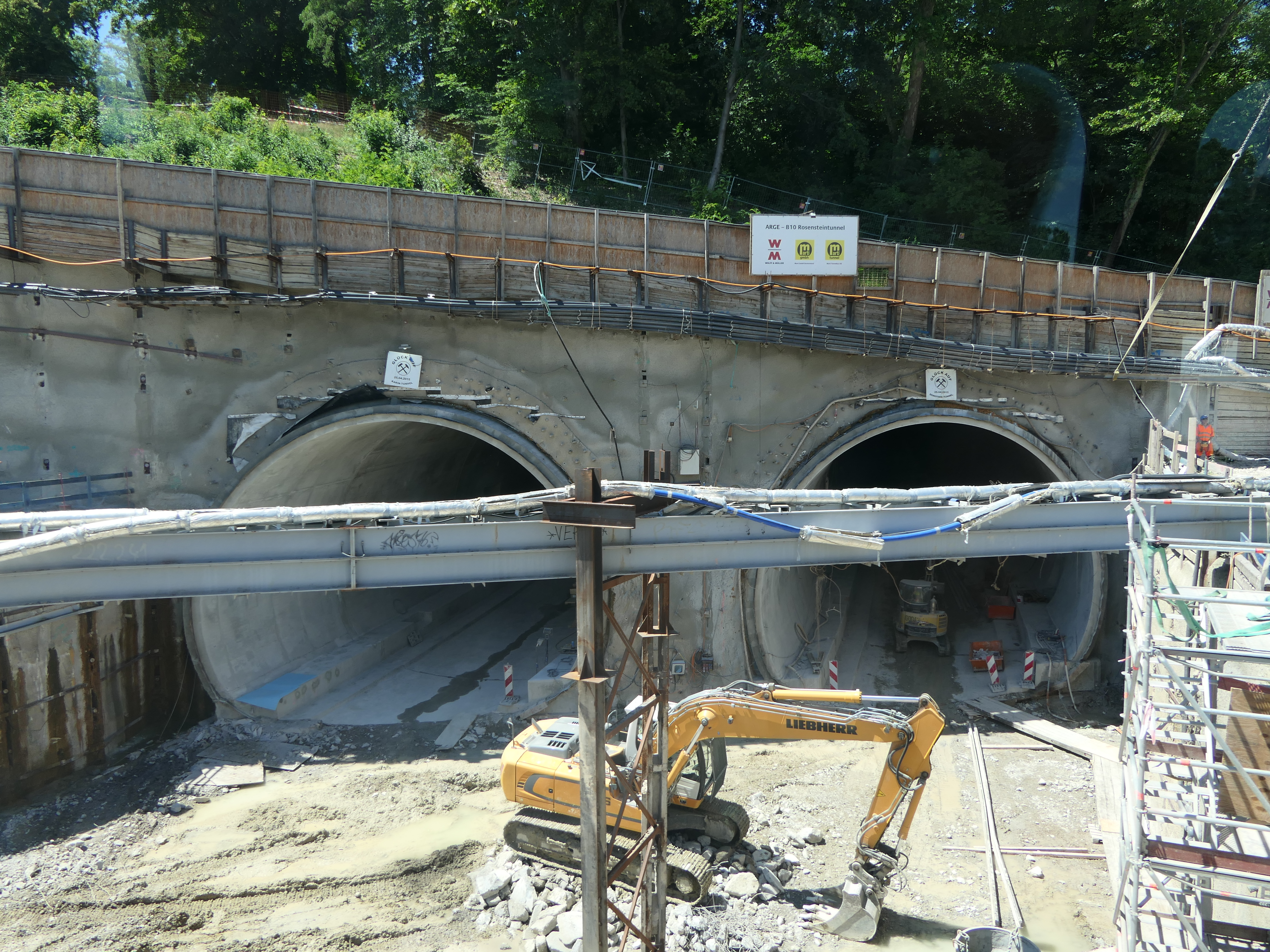 Das Ostportal des Rosensteintunnels (B10) im Juni 2018.